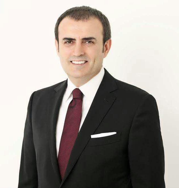 Mahir Ünal, akademisyen ve siyasetçi. 26. Dönem Türkiye Cumhuriyeti Kültür ve Turizm Bakanı.